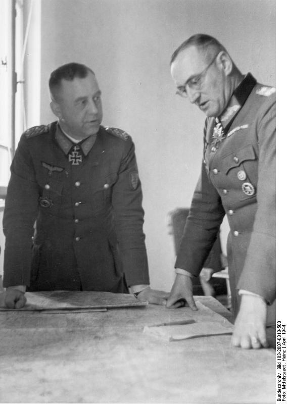 Prop.-Kp. 637 Film-Nr.: 3462/7A Bildberichter: Mittelstaedt Text: ders. Ort: Barlad (Rumänien) Datum: 11.4.44 Text: Der Oberbefehlshaber einer Heeresgruppe im Osten, Eichenlaubträger Generaloberst Schörner bei einer Lagebesprechung mit dem Oberbefehlshaber einer Armeegruppe, Ritterkreuzträger General der Inf. Wöhler.